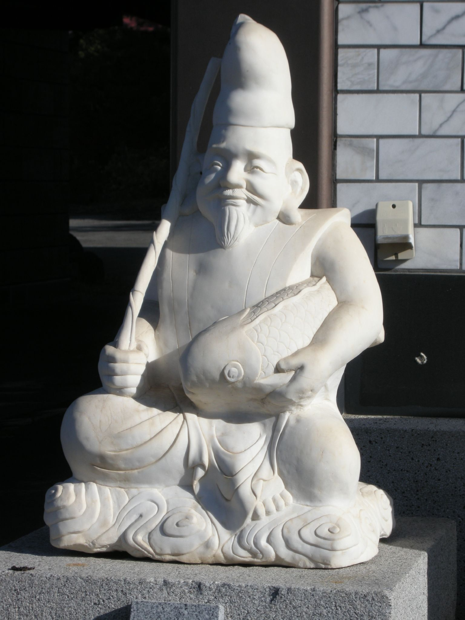 Una delle sette divinità della fortuna. Il dio giapponese dei pescatori, della buona sorte, dei mercanti e il guardiano della salute dei bambini piccoli. E' il solo dei sette che ha origine giapponese.